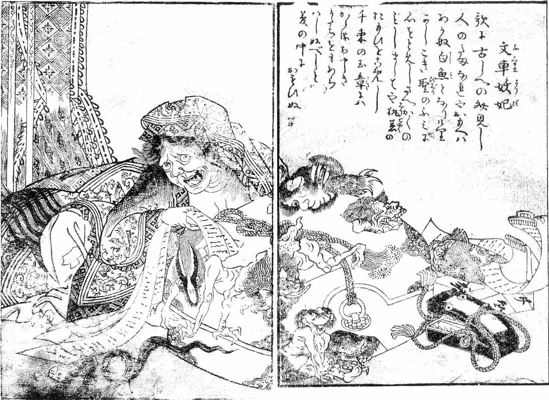 Fuguruma-yōki (文車妖妃) from the Gazu Hyakki Tsurezure Bukuro (百器徒然袋)